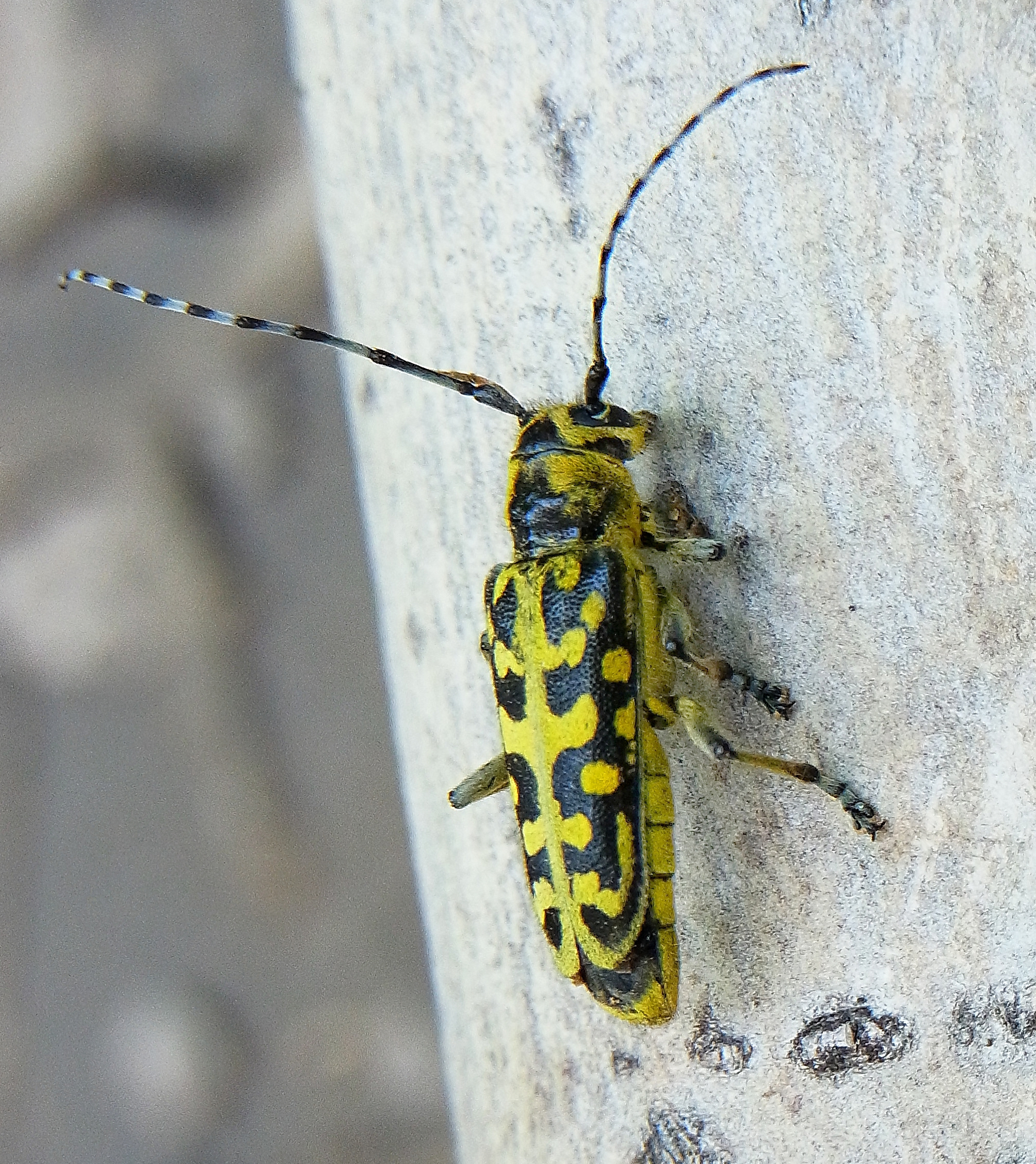 Saperda scalaris auf Pappelast Ungarn bei Mohacs am 12.5.2012